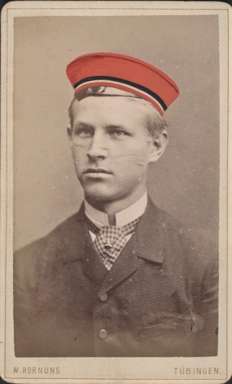 Paul Ramm als Student und Mitglied von Corps Suevia Tübingen (CDV, ca. 10 x 6 cm) In der KCL 1930, Corps-Liste 130, Jahr 1881, Nr. 340 Paul Ramm war später Regierungsrat in Eisenach